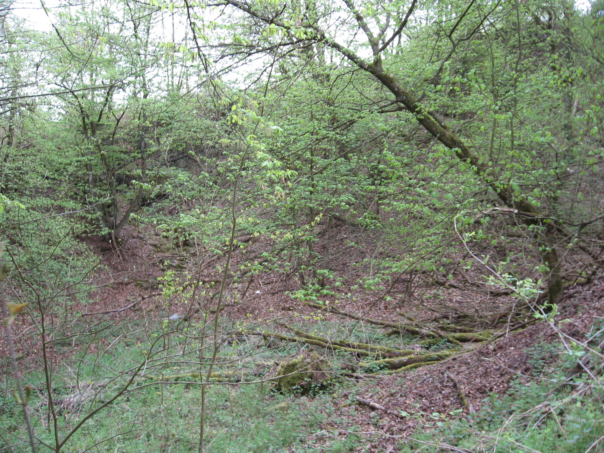 Teilansicht des Naturdenkmal Höveler Knapp südlich von Sundern-Hövel im Hochsauerland, NRW.